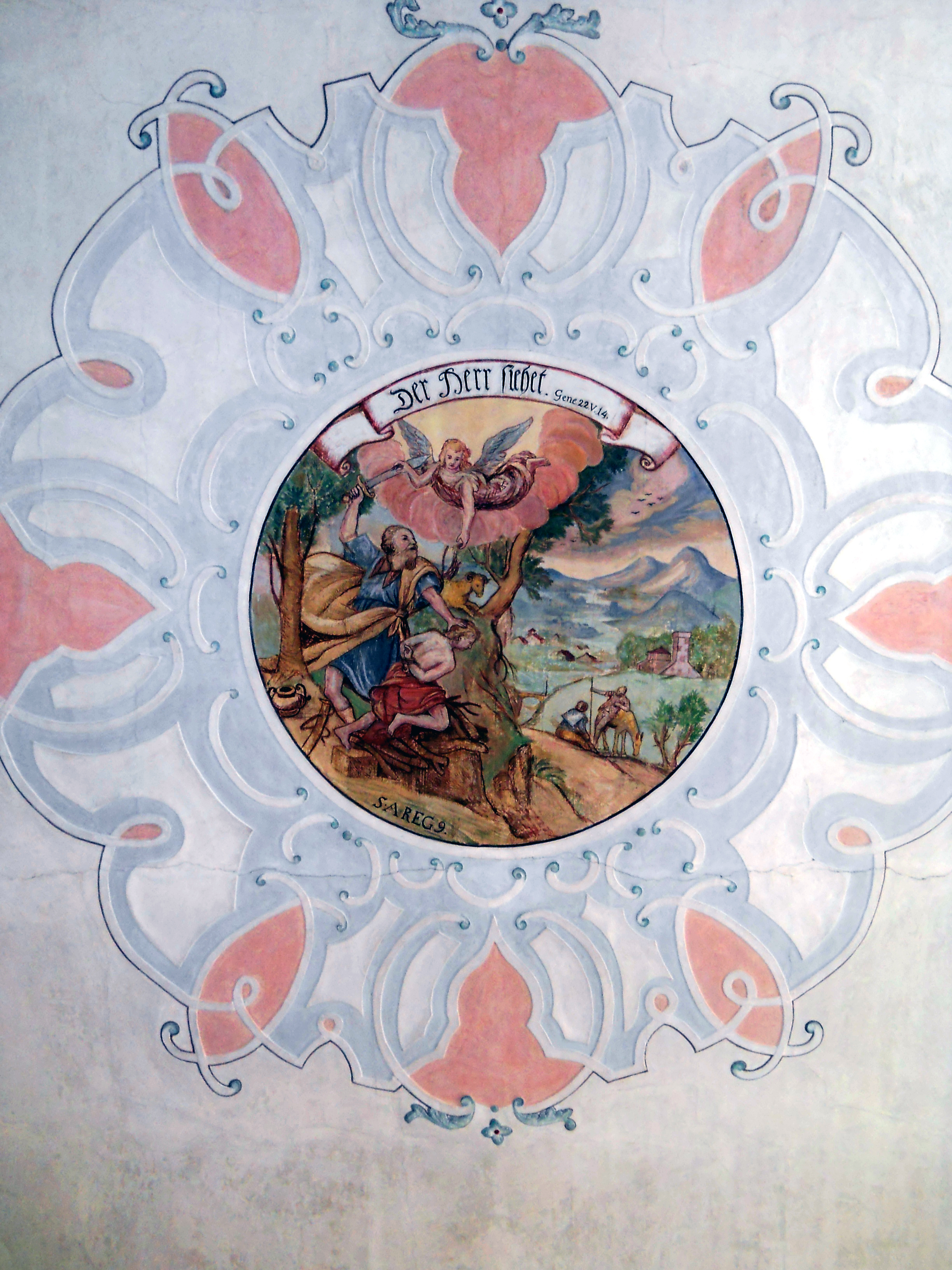 Haupt-Deckenfresko in der Pfarrkirche St. Bartholomäus in Egloffstein in der Fränkischen Schweiz